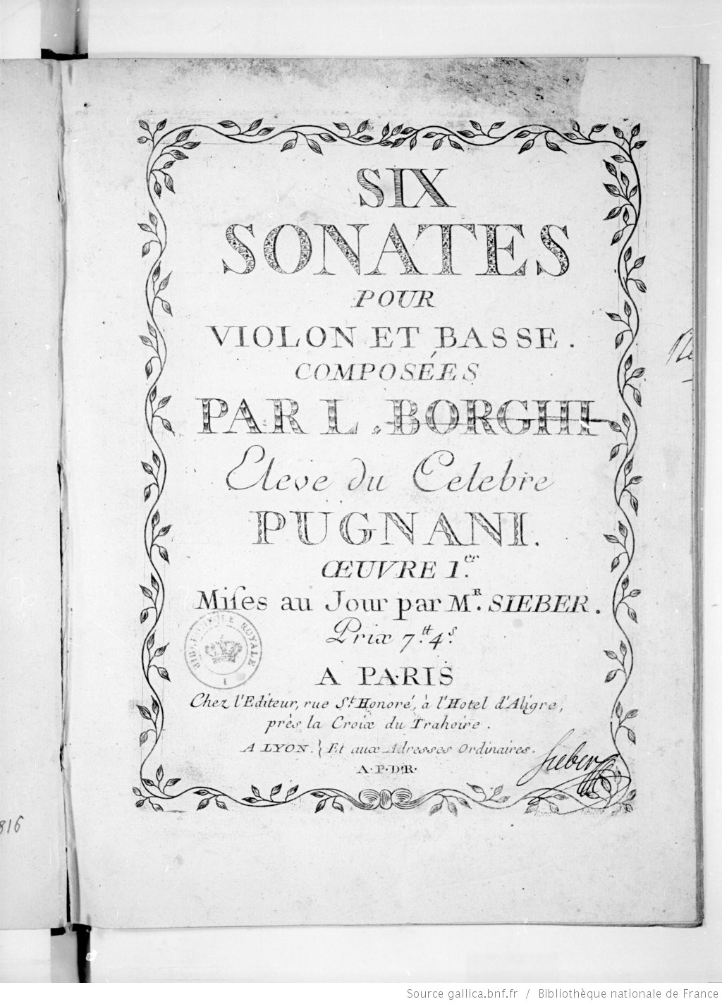 Six sonates pour violon et basse... Oeuvre I publié par Sieber à Paris en 1772.